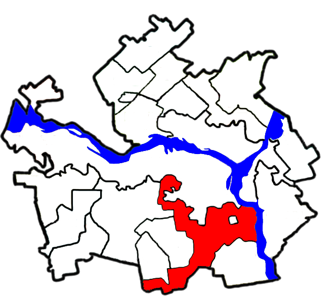 Новоолександрівська сільська рада, Дніпропетровський район